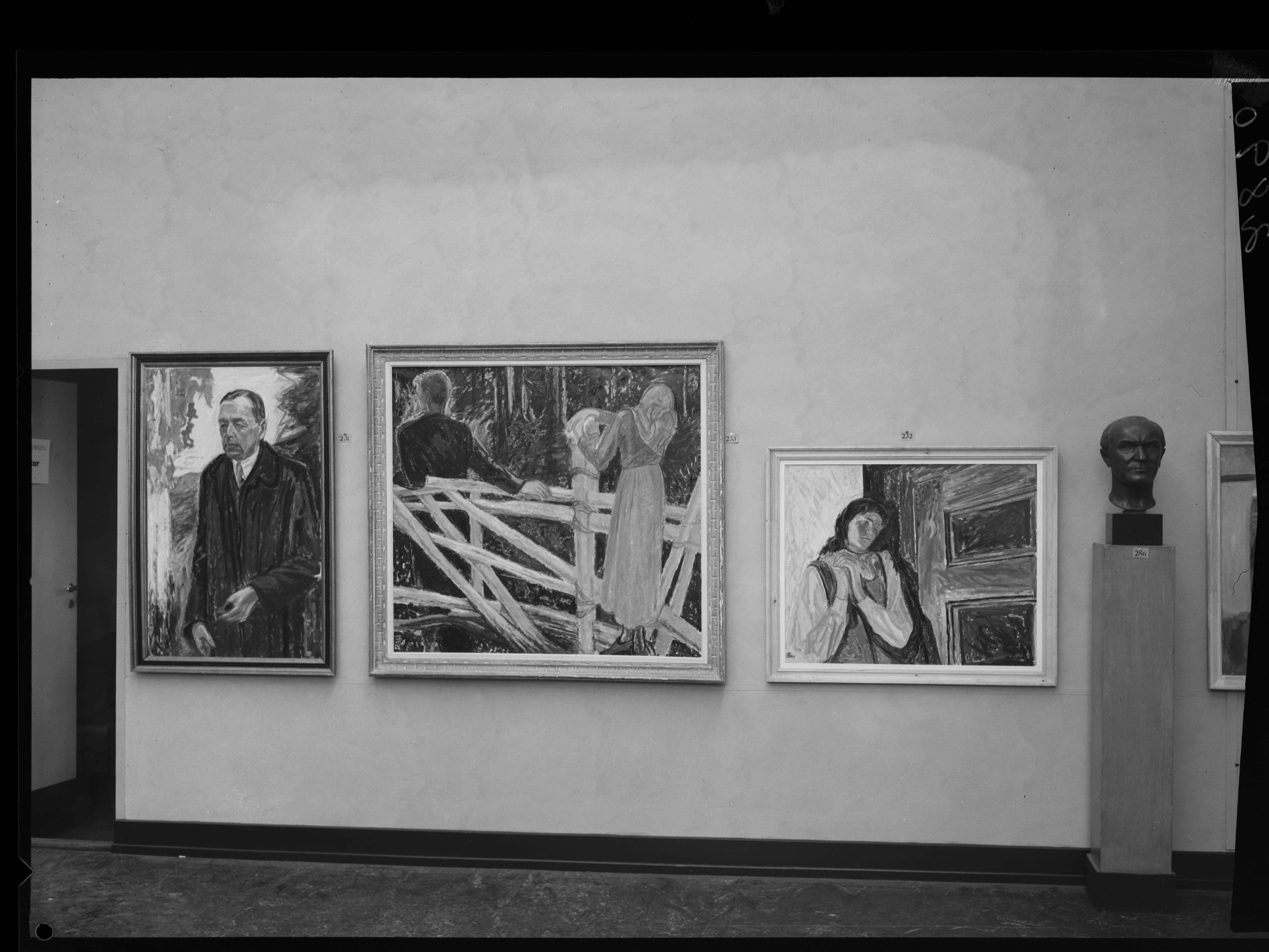 Bildet er hentet fra Nasjonalbibliotekets bildesamling. Anmerkninger til bildet var: Fotograf ukjent. Oslo, Oslo, Oslo